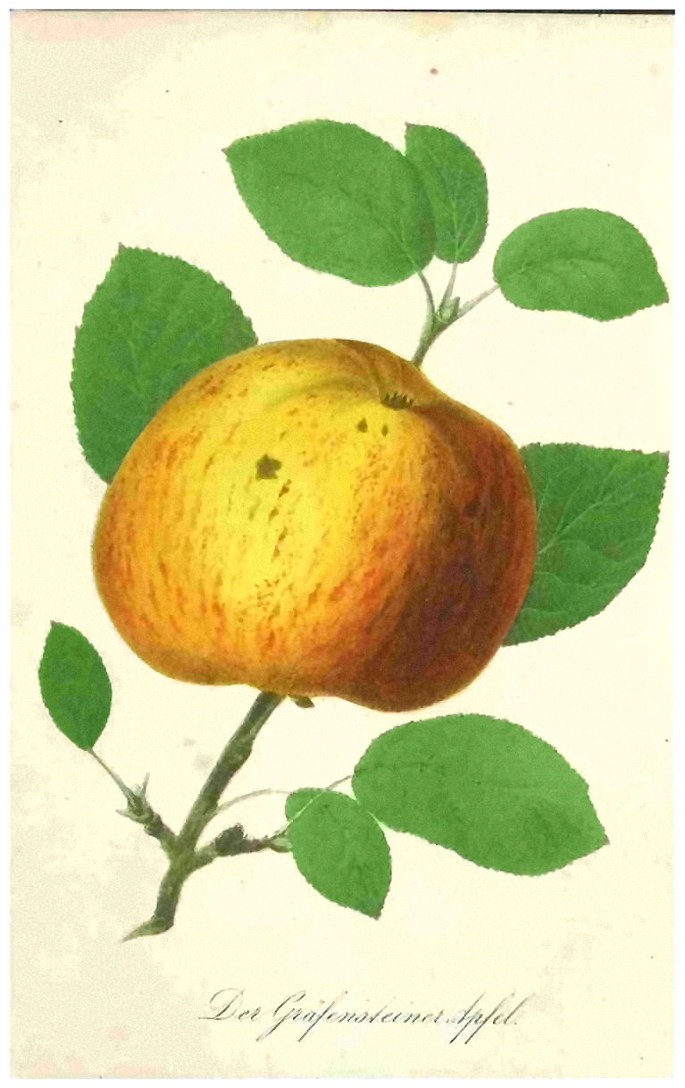 Kolorierte Abbildung der Apfelsorte ‘Gravensteiner’